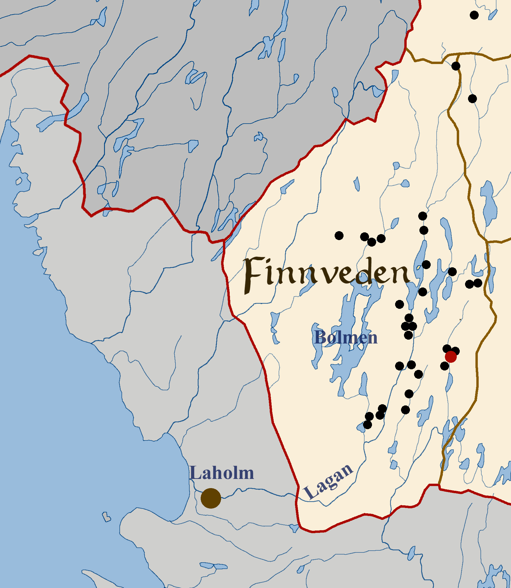 Map of Finnveden, Sweden with rune stones.